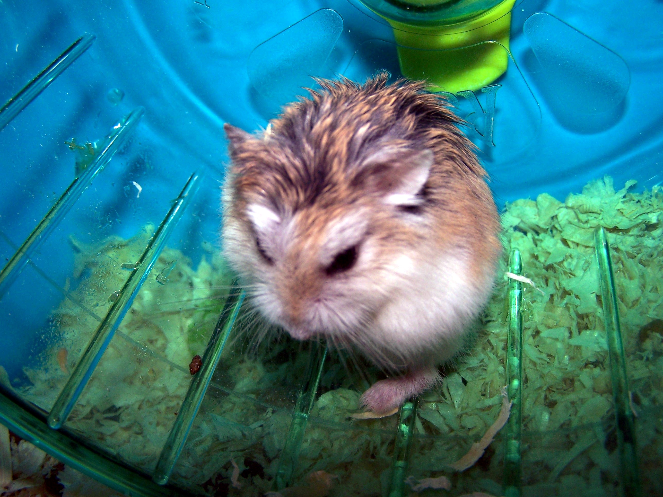 Roborovski Dwarf Hamster